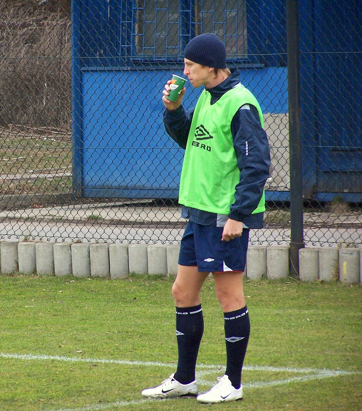 Marcin Baszczyński podczas trenngu Wisły w 2007